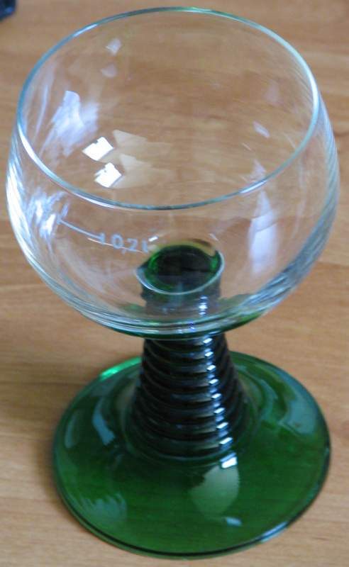 Weinglas Römer Andere Versionen